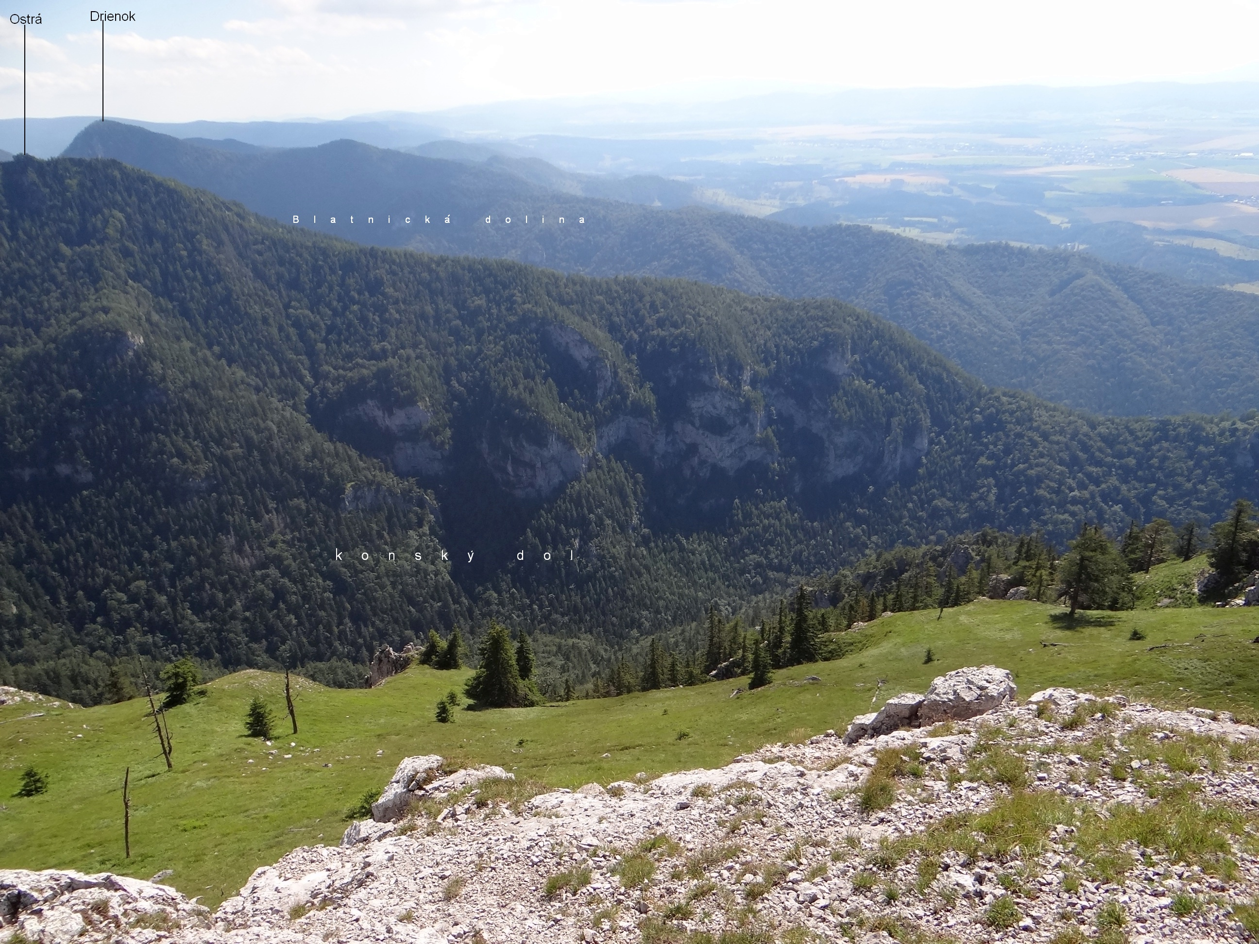 Konský dol